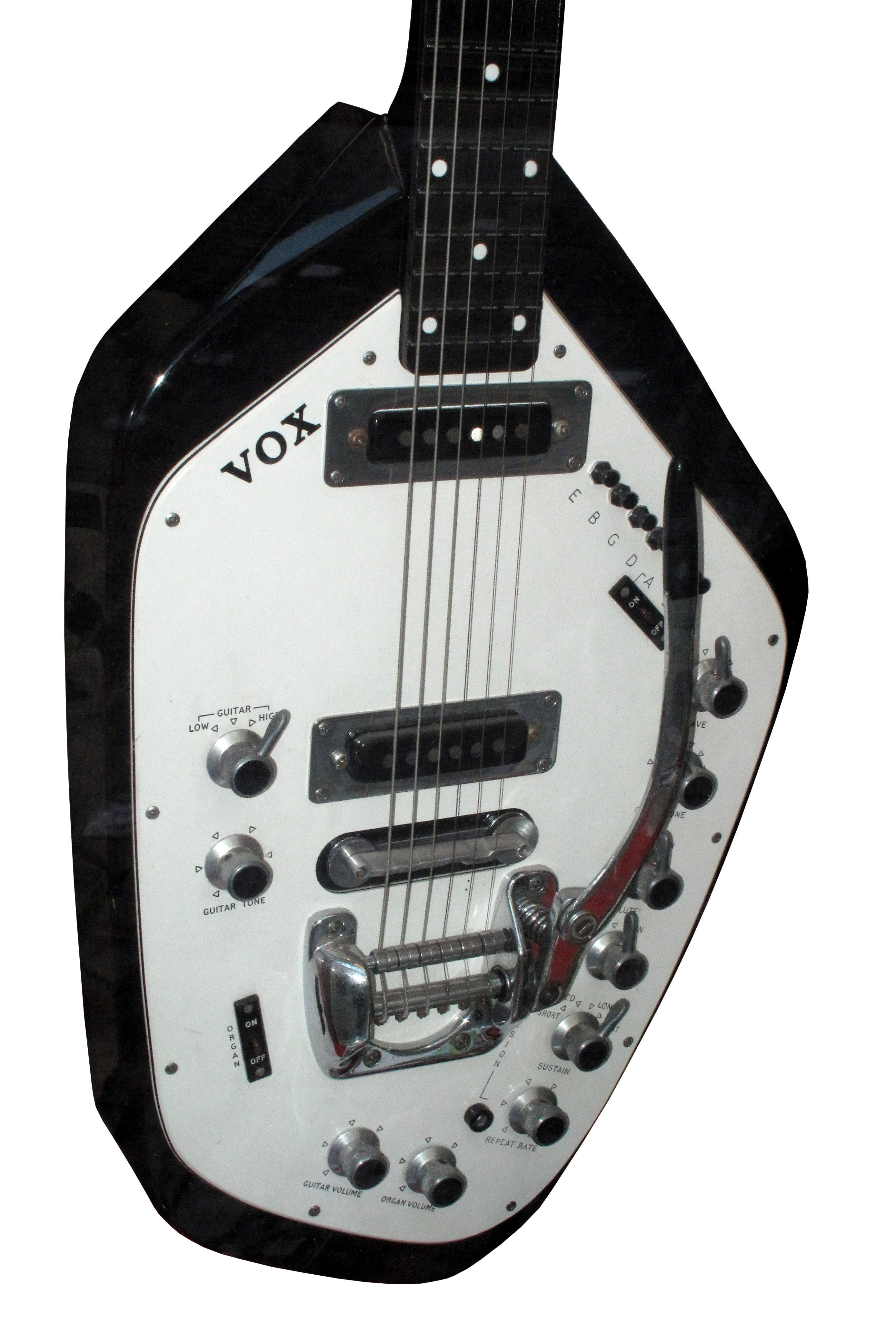 Guitorgan Vox V251